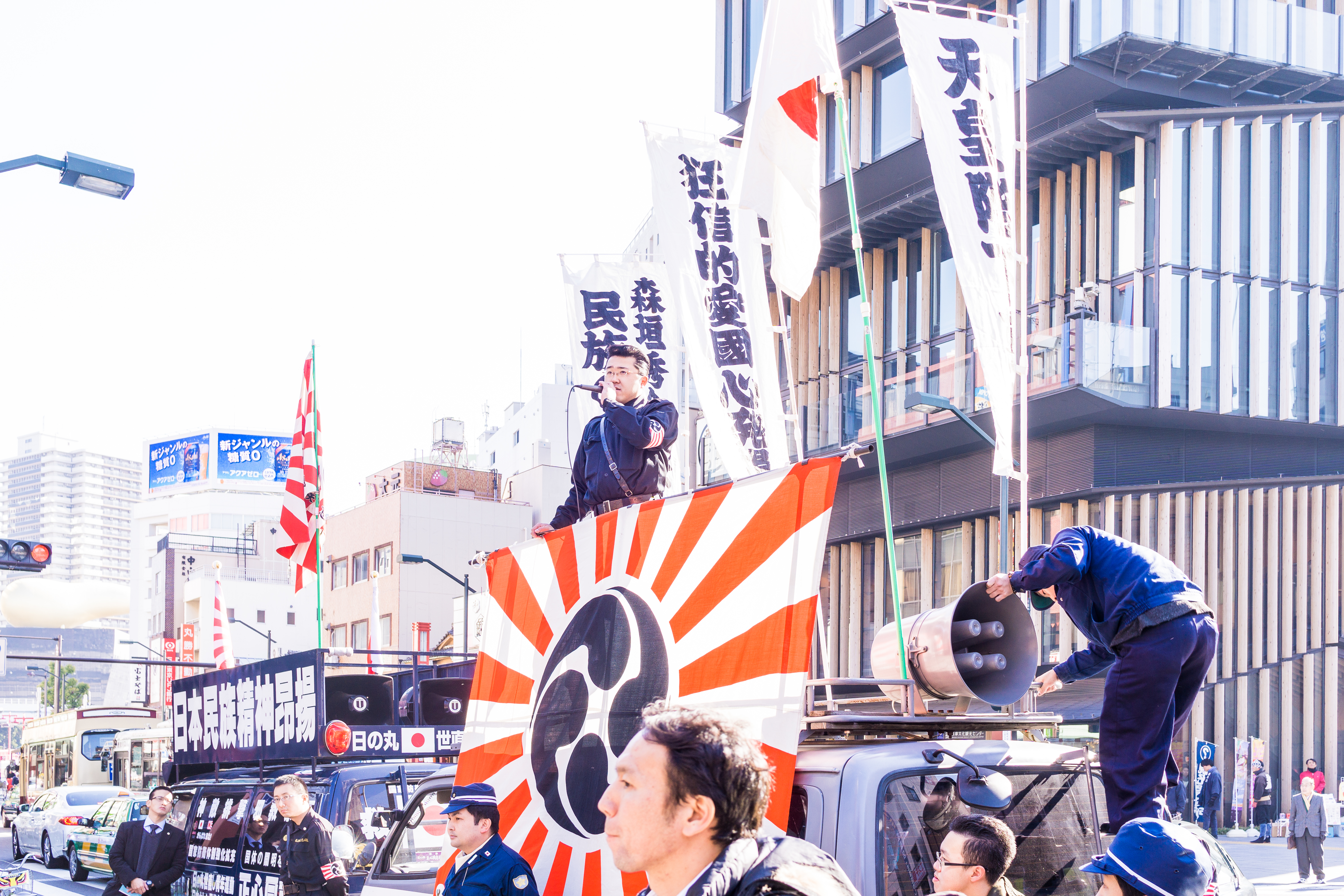 浅草 / Asakusa